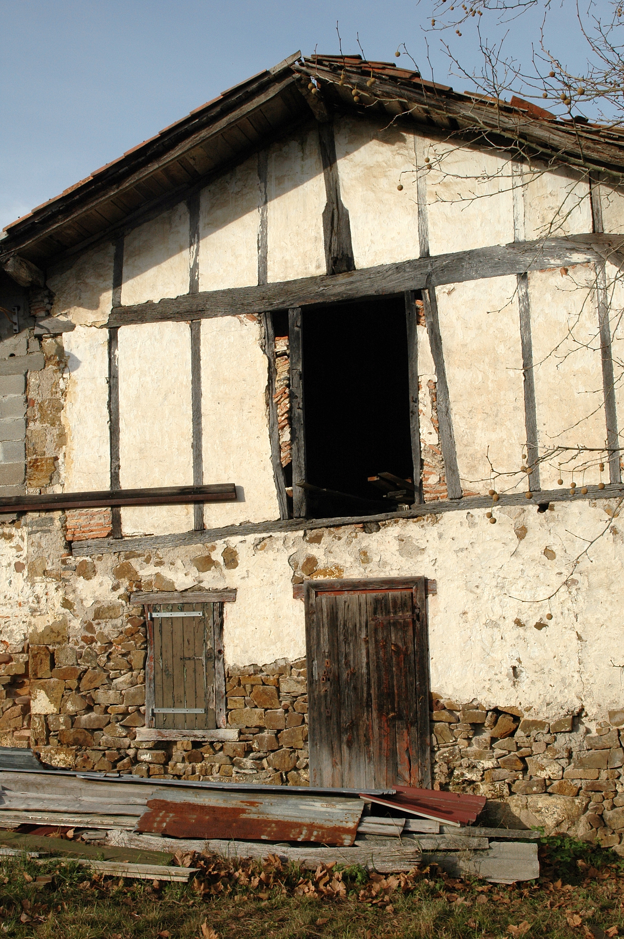 Jatxou, vieille ferme. Photo prise le 31/12/06 par Harrieta171